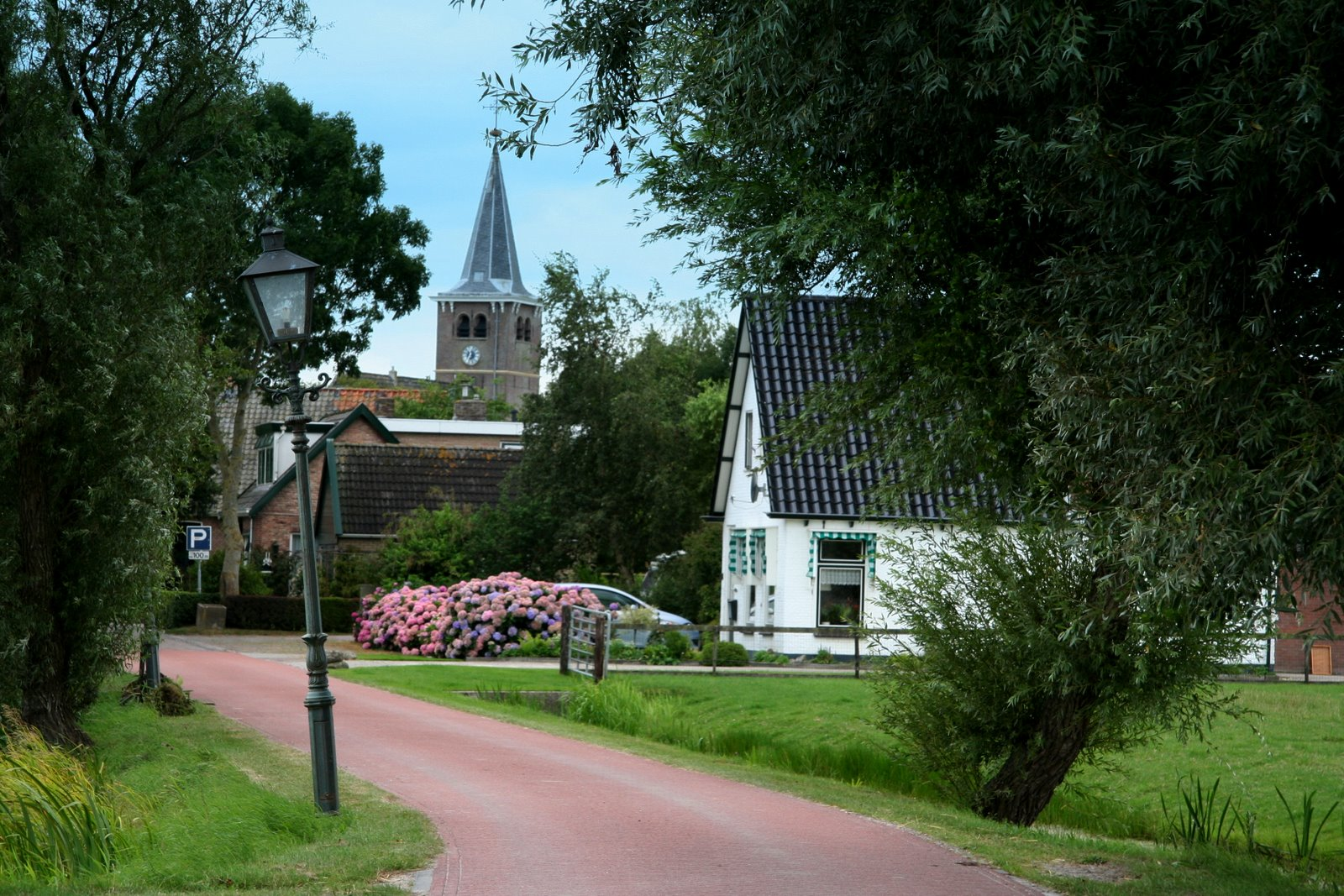 Gezicht op Blessum.